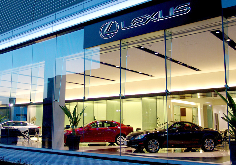 Lexus Japan